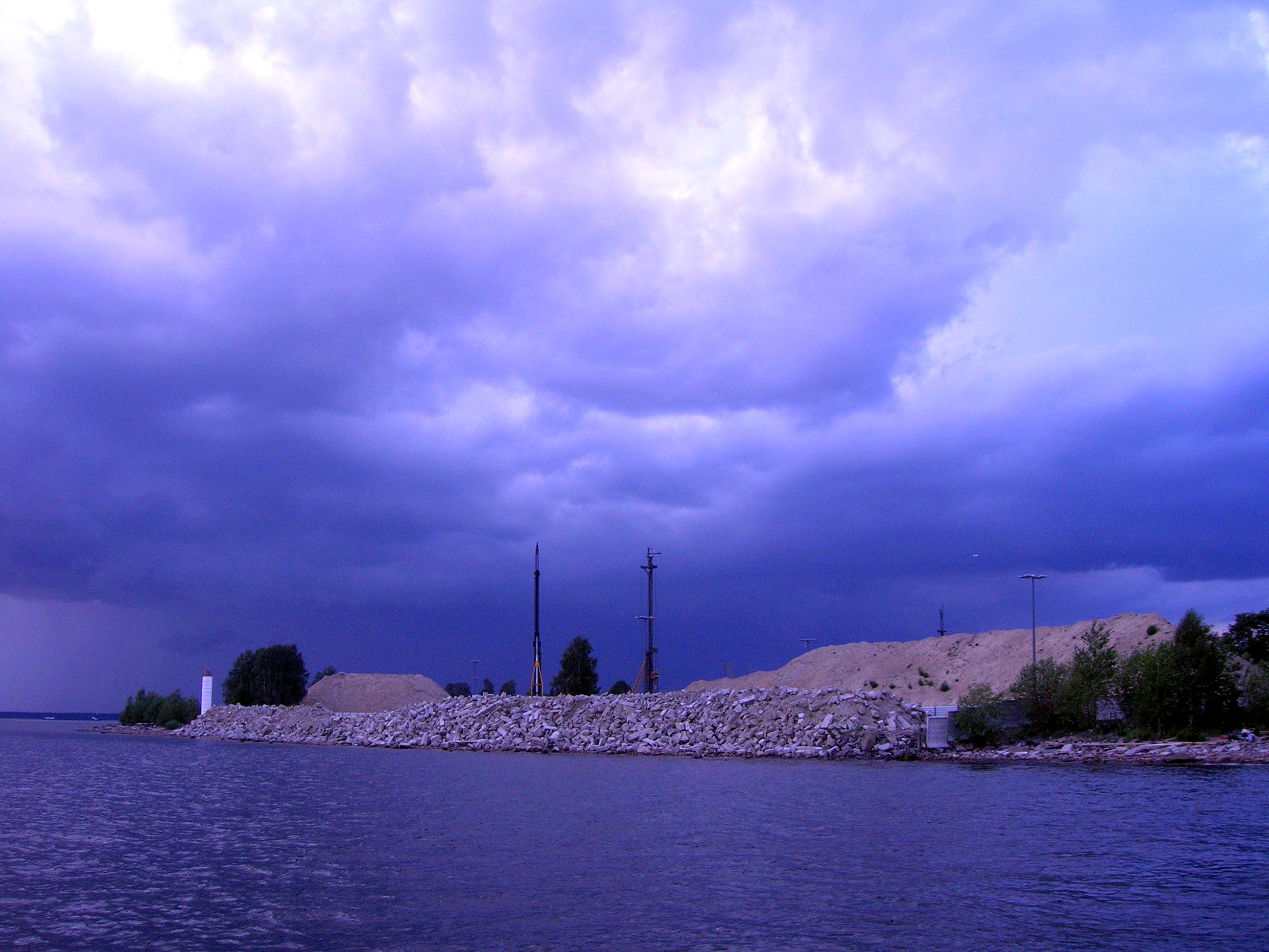 Крестовский остров, пристань, Финский залив